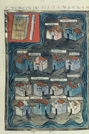 Dux Britanniarum from Notitia dignitatum